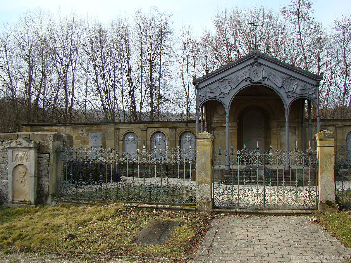 Berlichingen-Grablege auf dem Friedhof in Jagsthausen